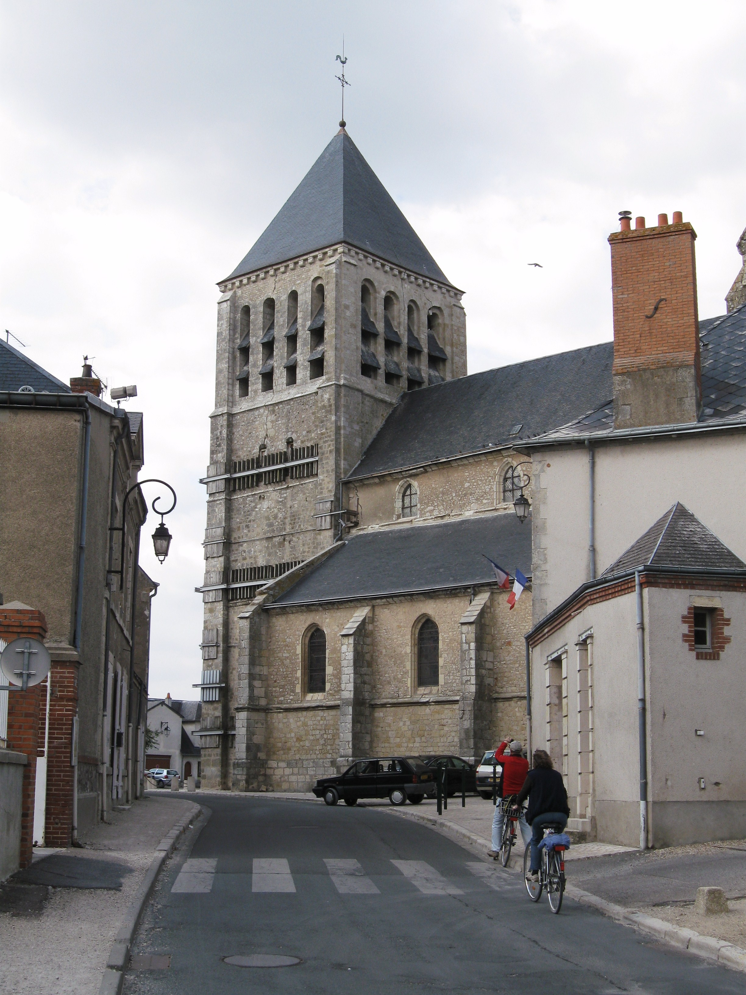 Église Saint-Pierre de Chécy, Loiret, France